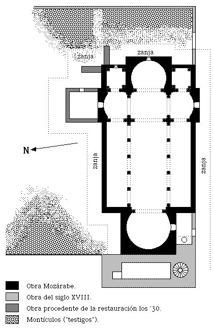 San Cebrián de Mazote (provincia de Valladolid, España). Iglesia prerrománica de estilo Mozárabe; es de cruz latina; la cabecera es cuadrada por fuera, y en herradura por dentro, y a los pies hay un raro contraábside. Siglo X (10th Century)